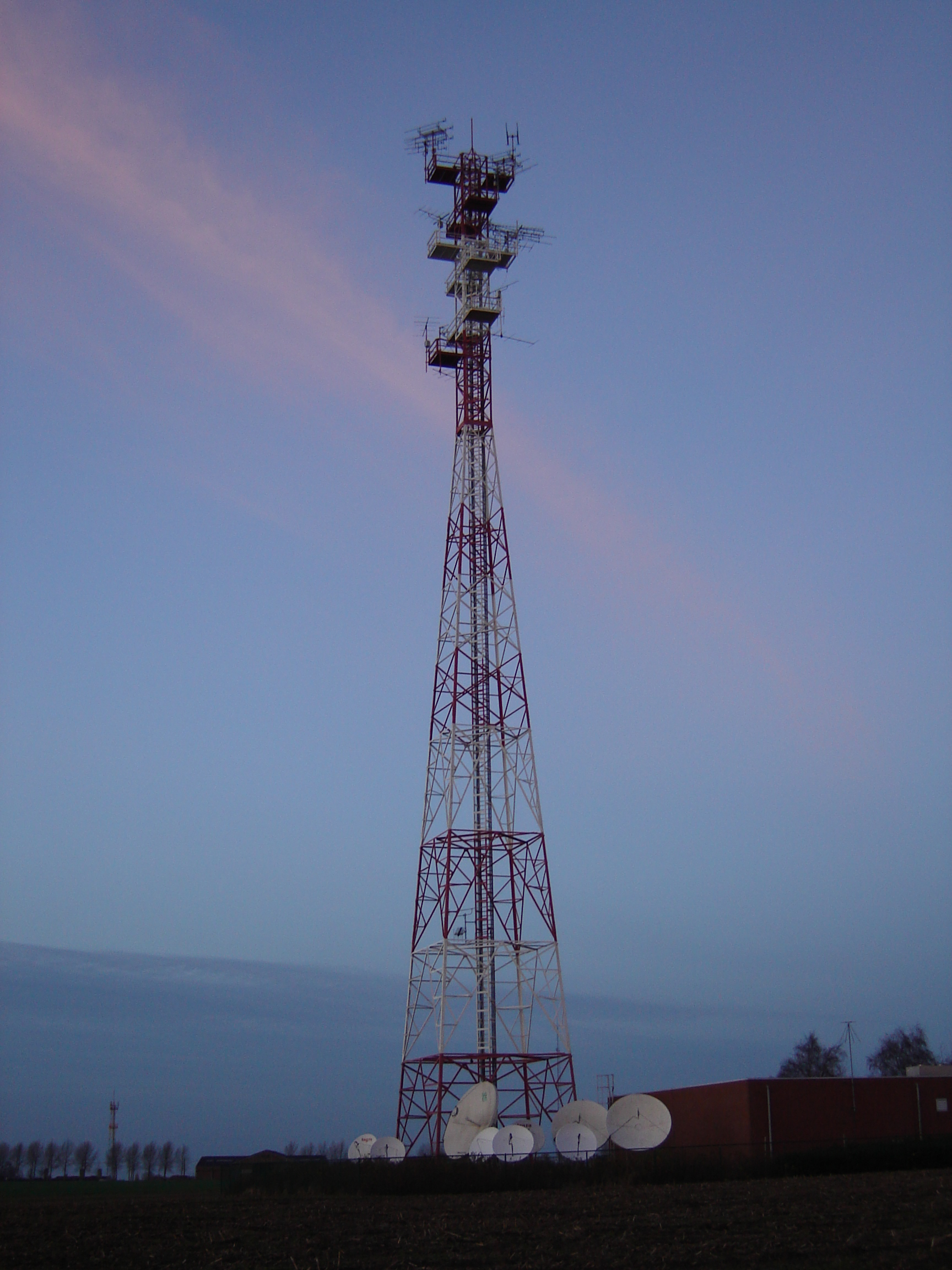 Transmitter mast on the Koekelareberg (Ruidenberg) hill in Koekelare, West-Flanders, Belgium